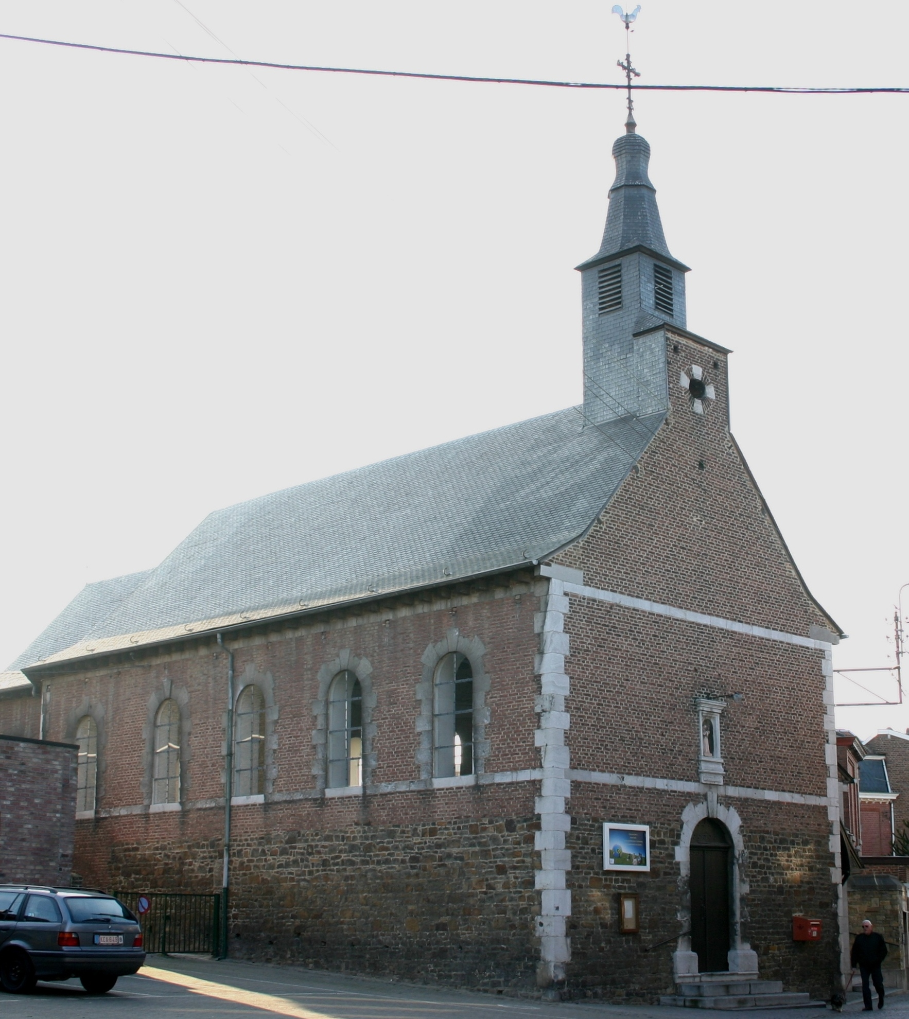 Kierch vu Bellaire.